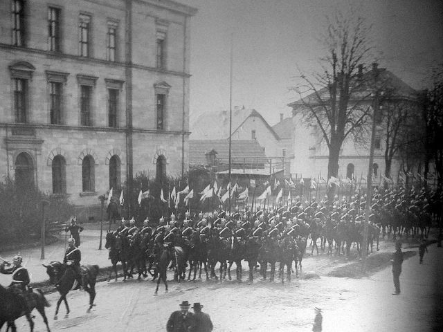 Das königlich bayerische Chevauleger Eskadron in Neumarkt vor der königlichen Oberrealschule